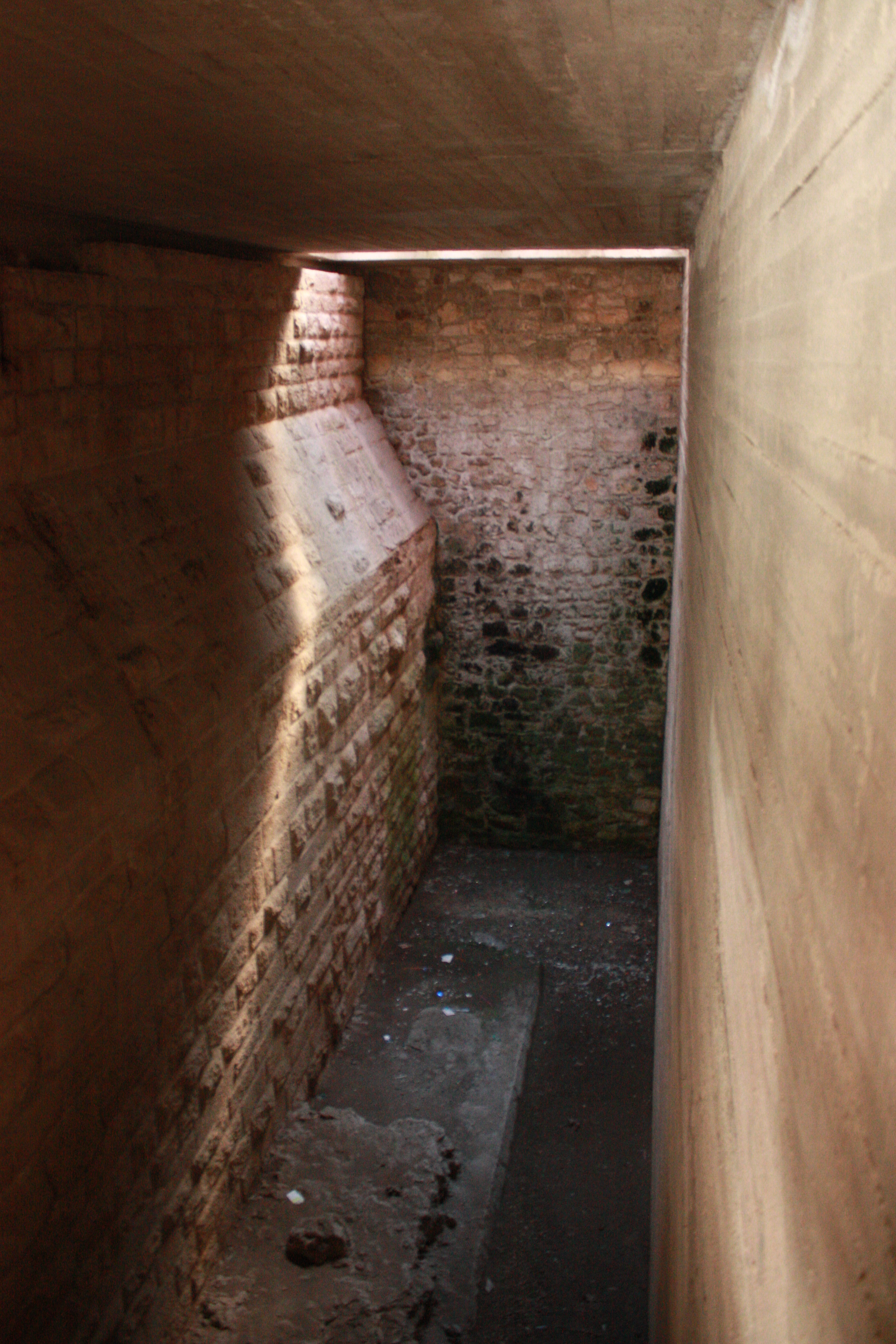 Castello di Barletta - Muro a mare dell'antico "palatium" angioino.